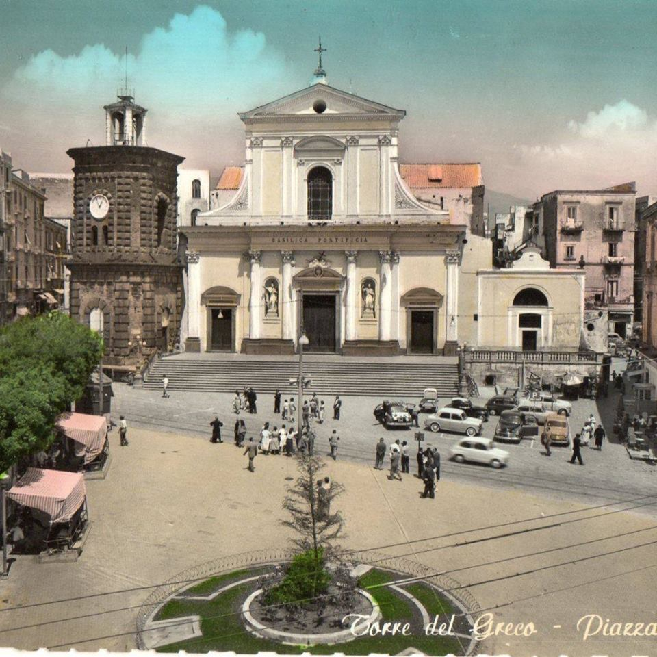 Cartolina